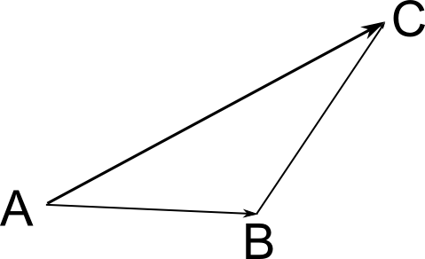 somme de vecteur bout à bout